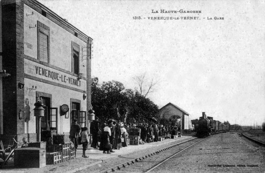 Le bâtiment voyageurs, le quai et la voie avec un train à vapeur entrant en gare vers 1900.